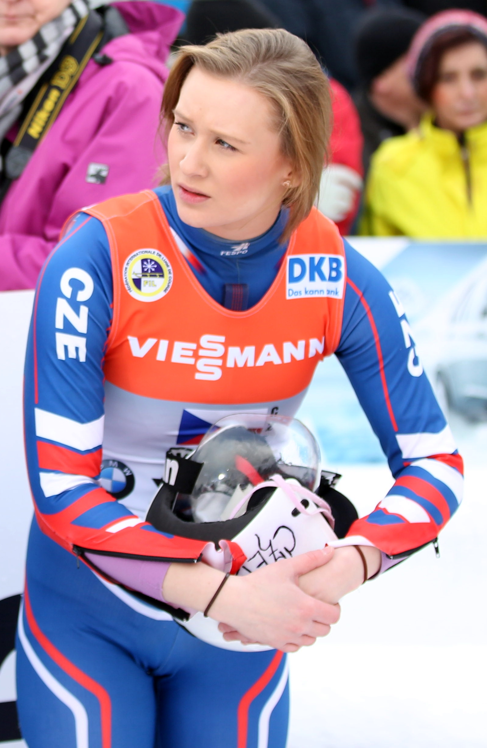 Tereza Noskova beim Rennrodel-Weltcup 2017 in Oberhof